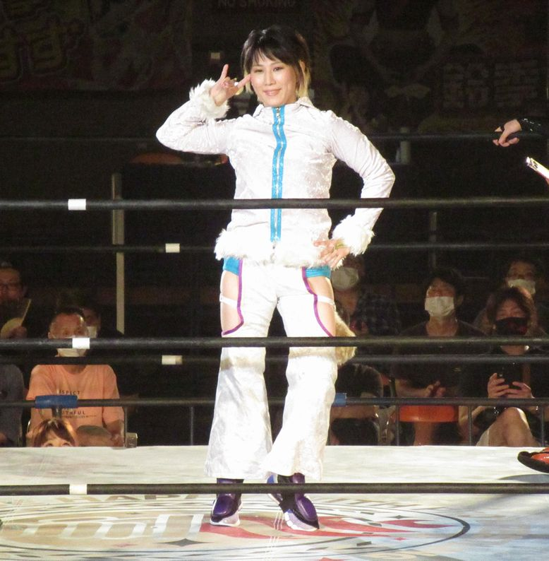 2020年8月9日横浜文化体育館